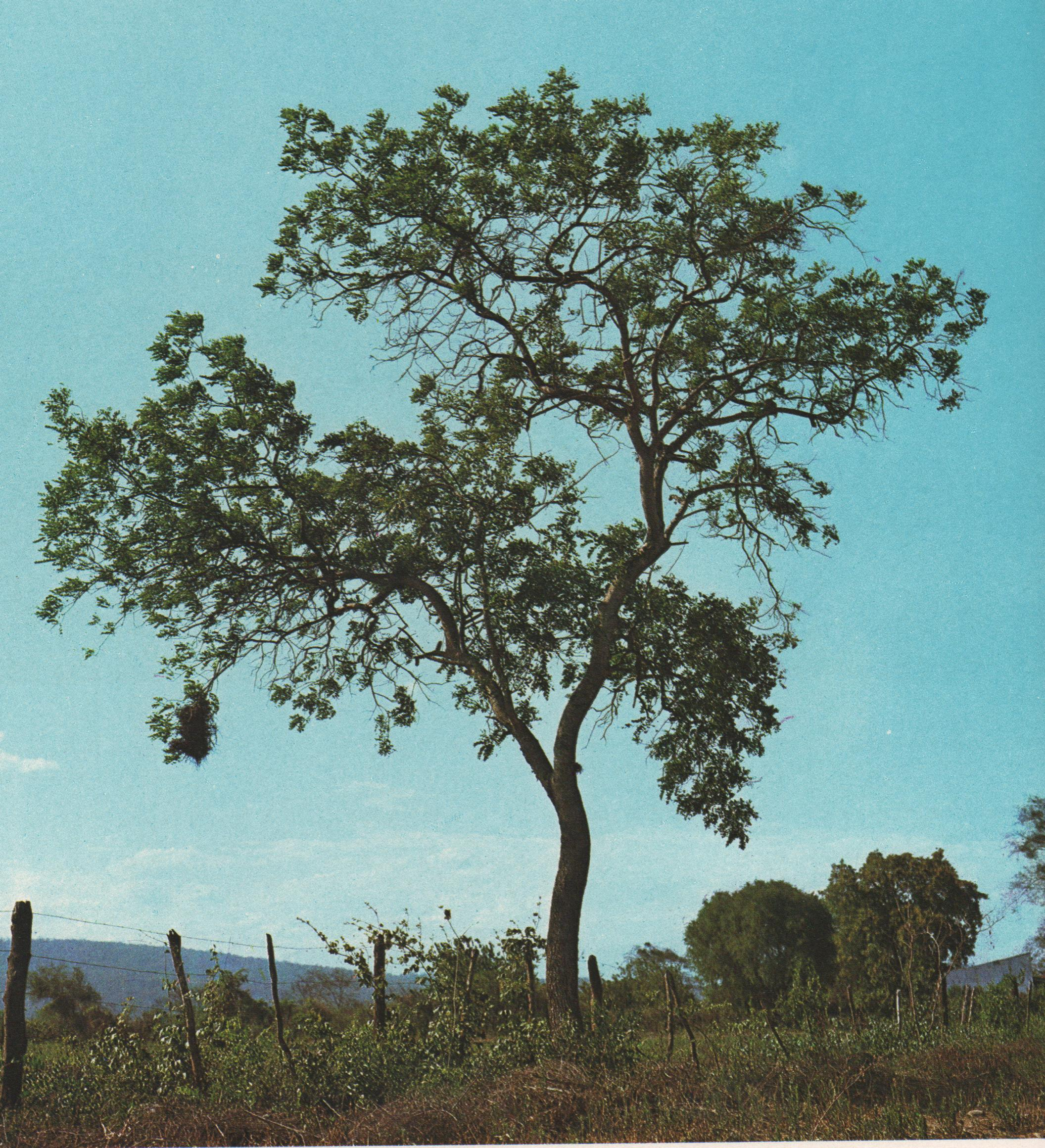 Ejemplar de Pterogyne nitens en la Argentina.